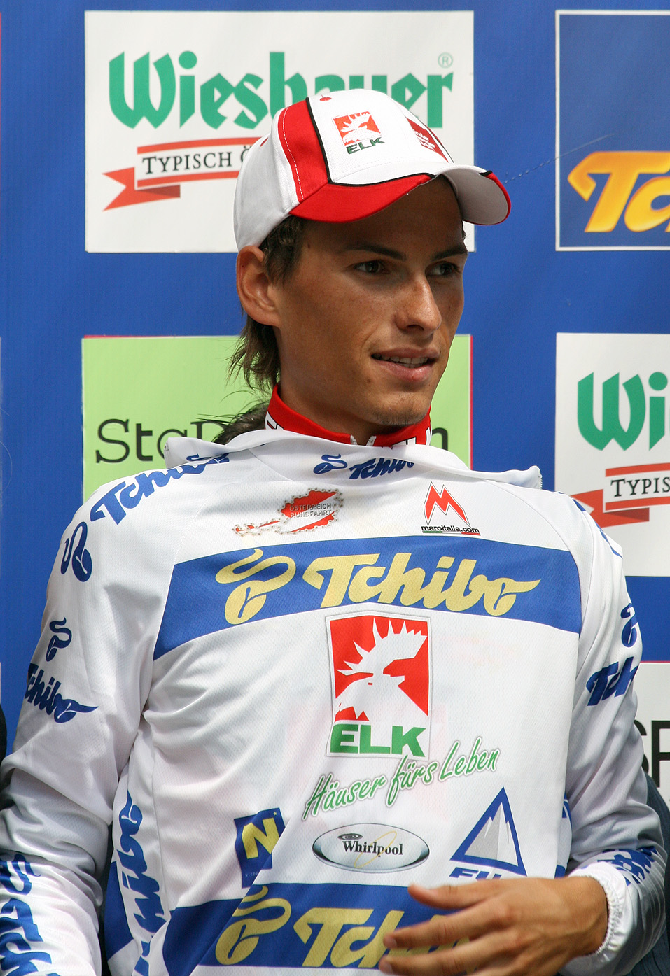 Österreich-Rundfahrt 2009: Stefan Denifl, der bestplatzierte Österreicher der Tour